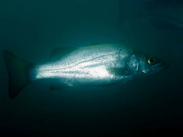 ヒラスズキ Lateolabrax latus